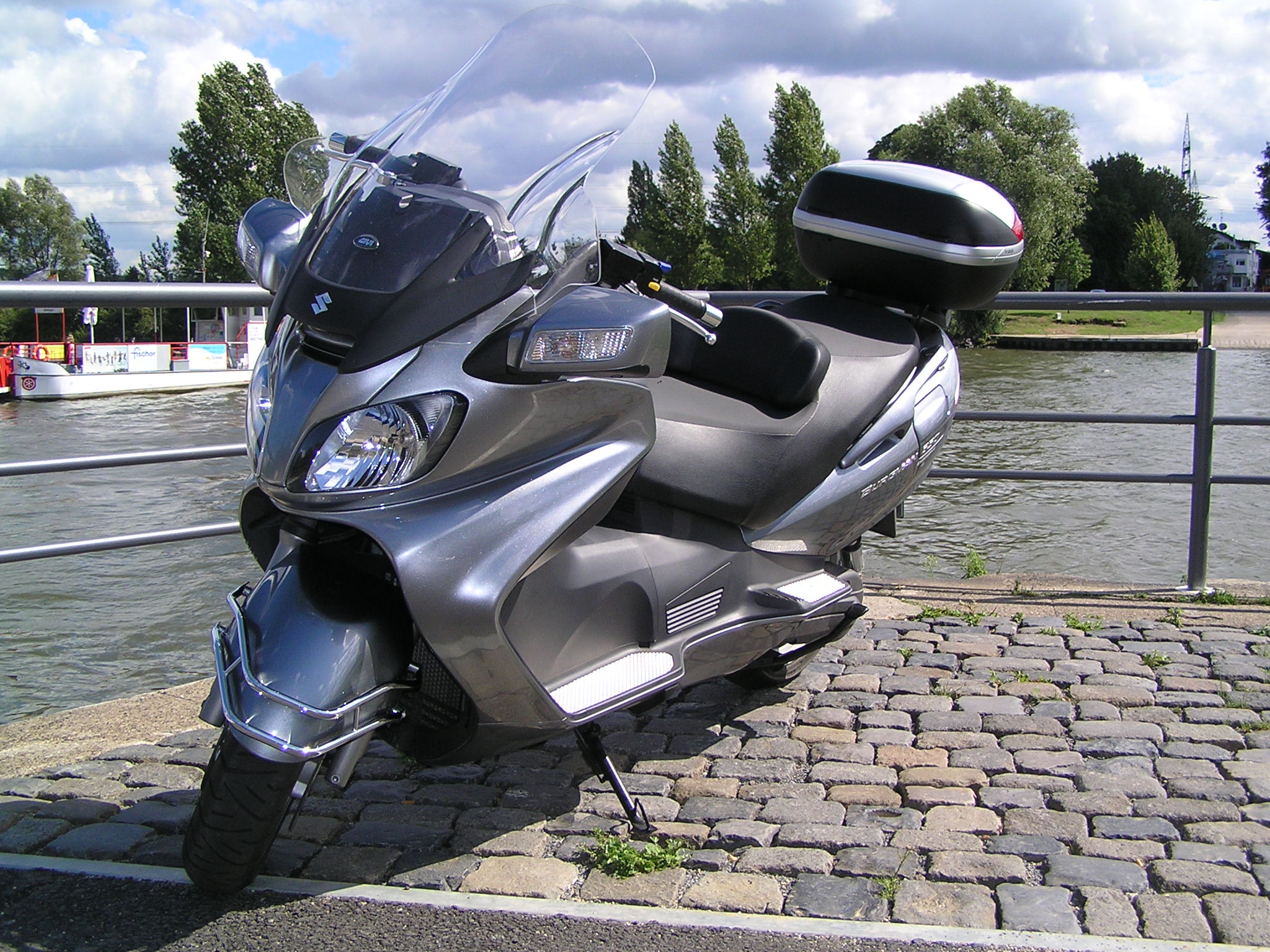 Der weltgrößte Motorroller: SUZUKI Burgman650 (AN650) Baujahr 2006, mit großer Frontscheibe